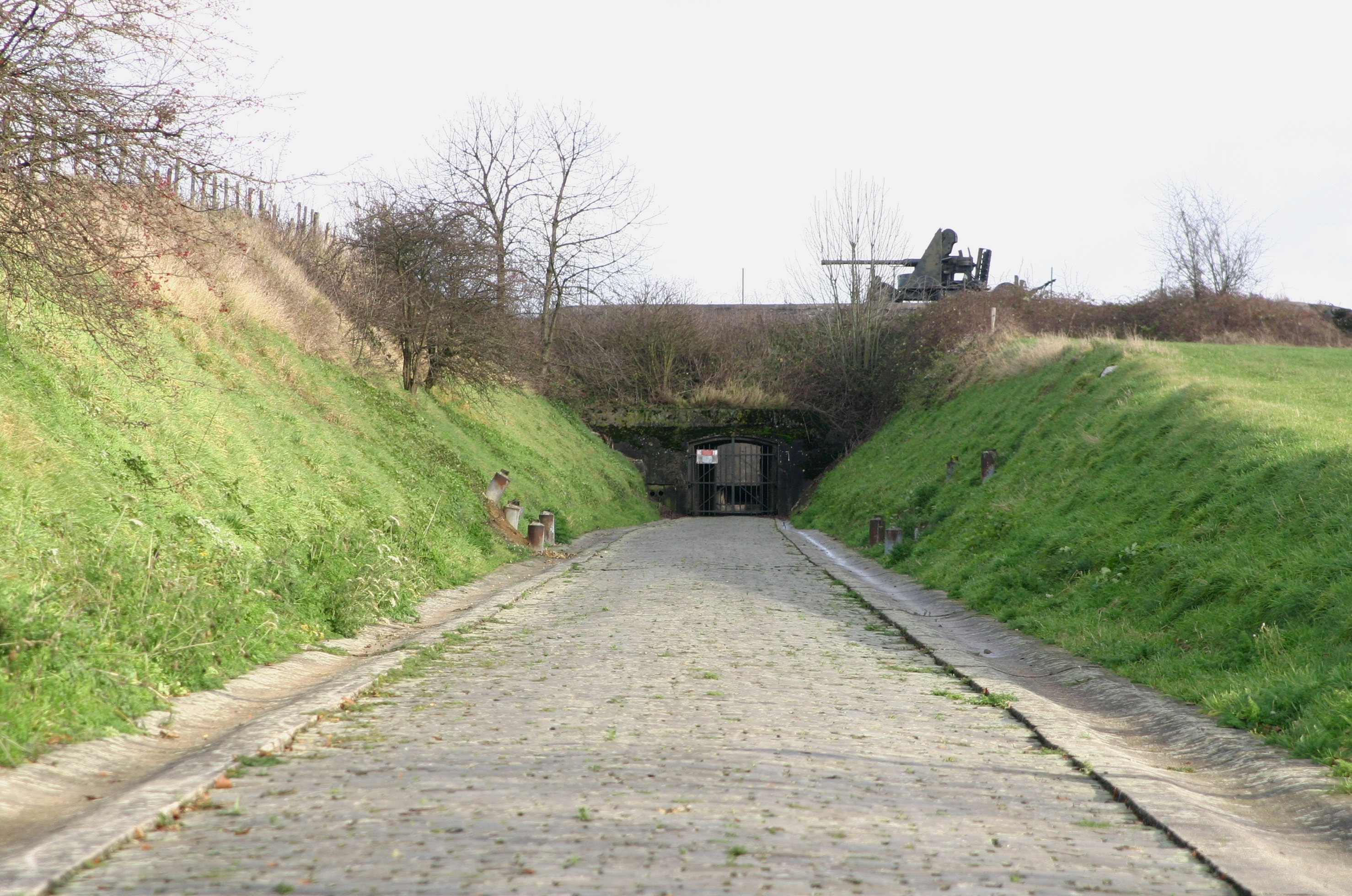 Entrée vum Fort op der Säit vun Neufchâteau.